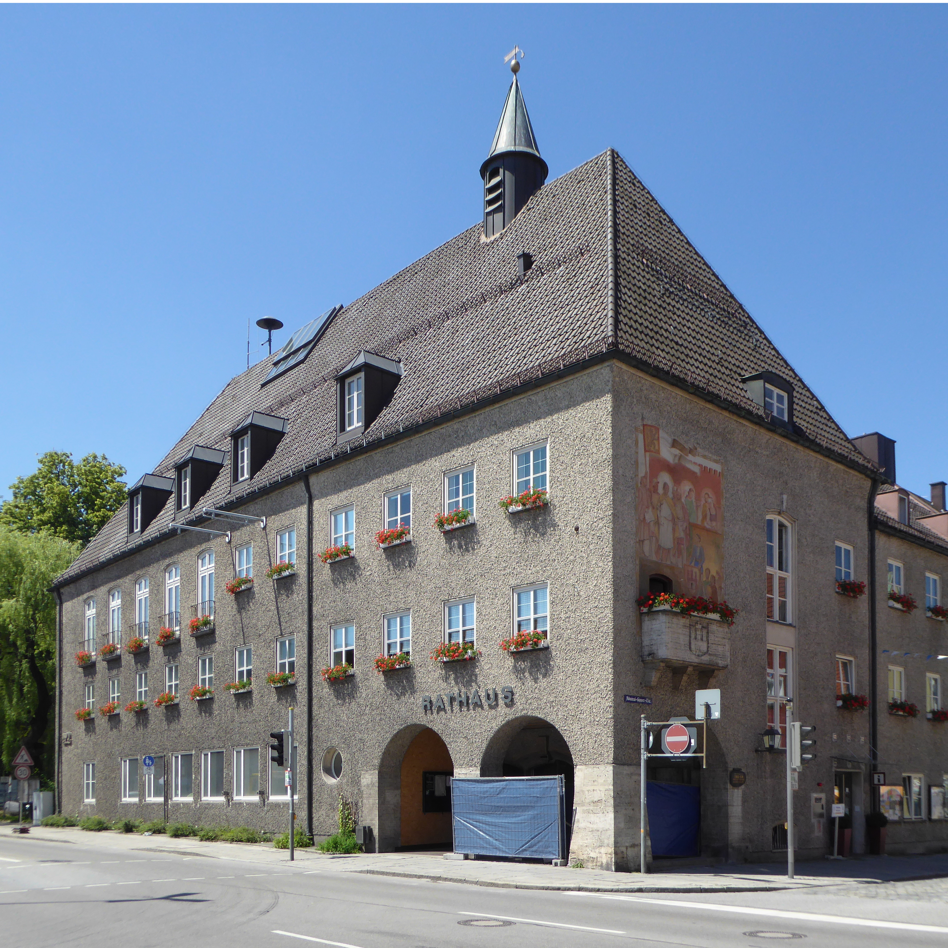 Weilheim in Oberbayern, Neues Rathaus von Nordosten.